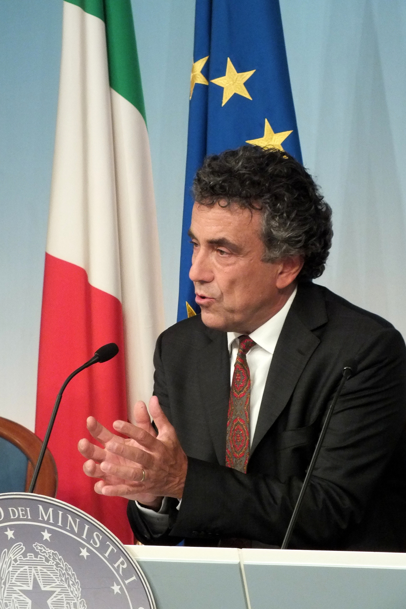 Fabrizio Barca alla presentazione di “Giovani del non profit per lo sviluppo del Mezzogiorno”: bandi per il Terzo settore.